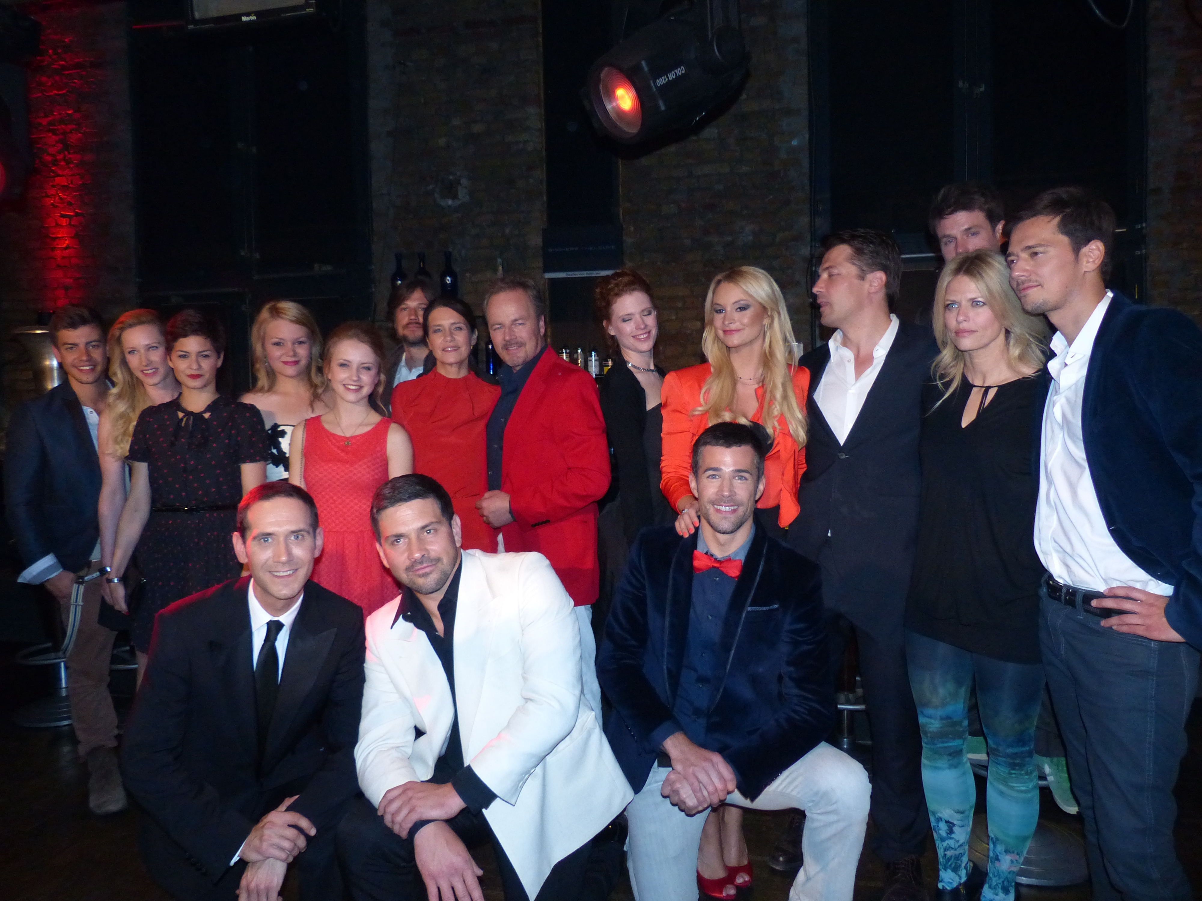 18 Jahre Verbotene Liebe Party, Düsseldorf